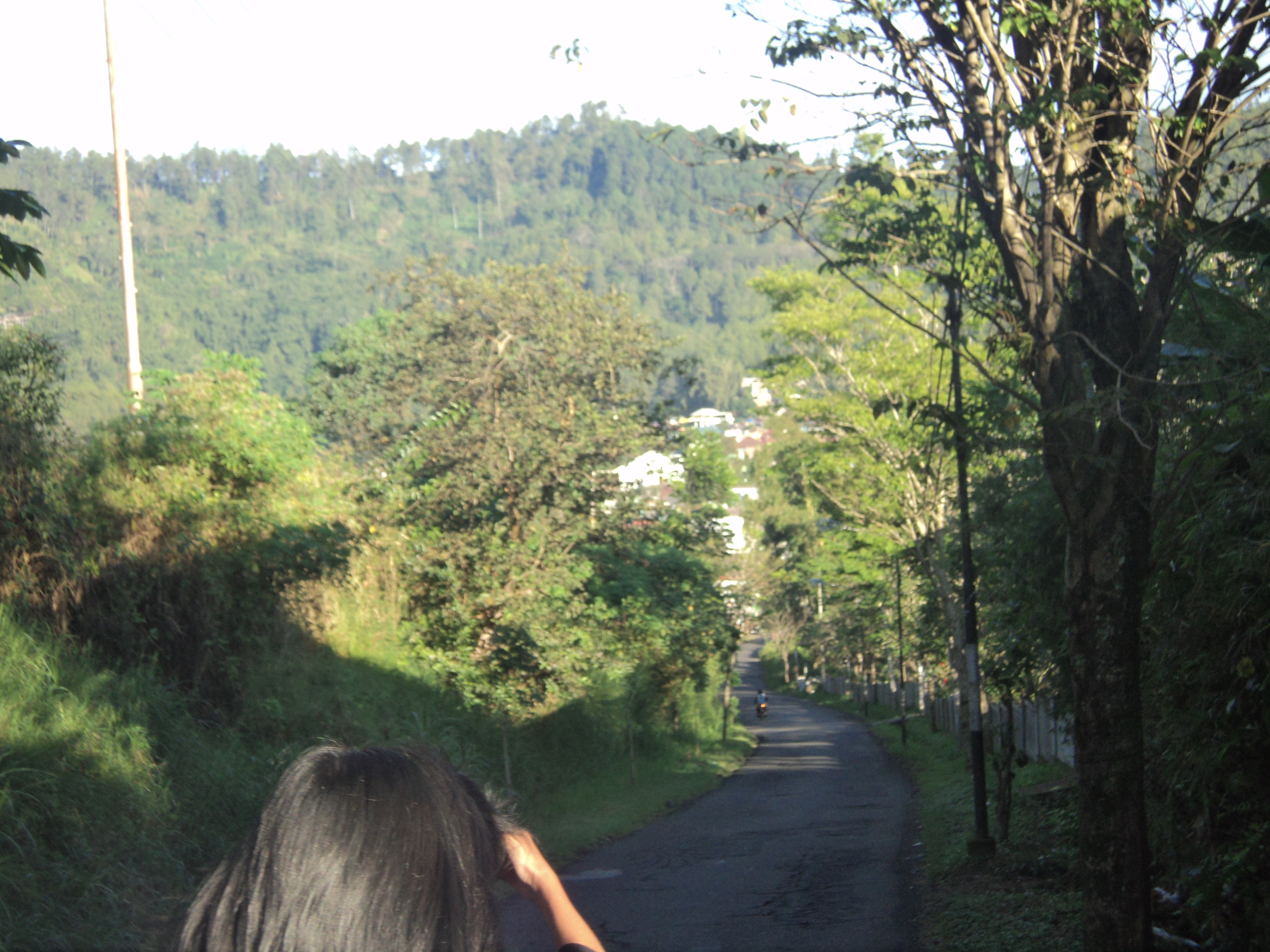 Jalan menuju kawasan wisata paralayang